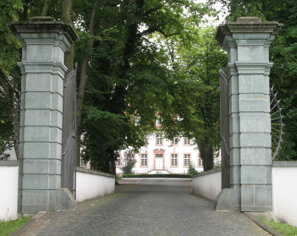 Rheda-Wiedenbrück, Amt Reckenberg, Zufahrt